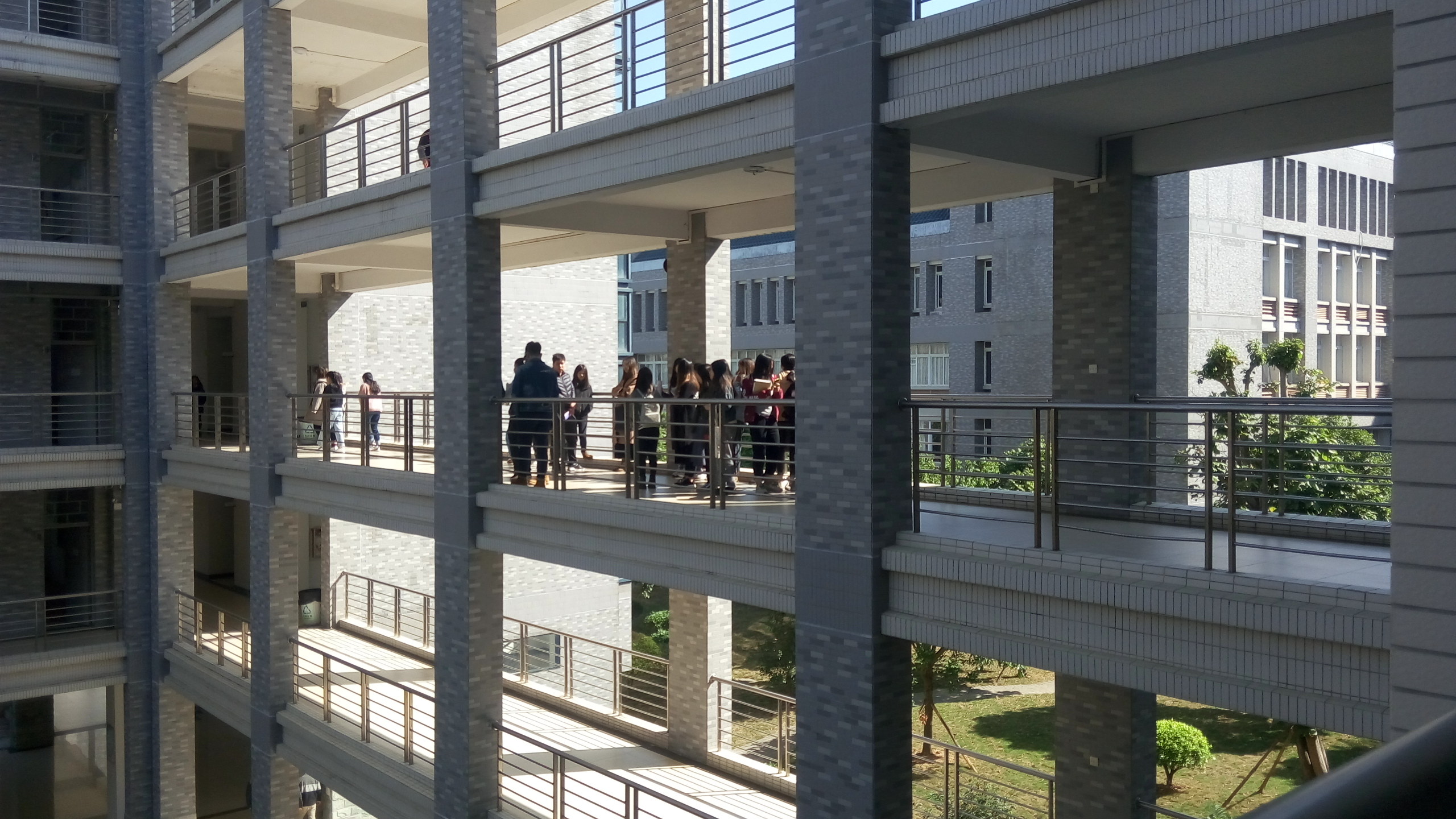 中文（中国大陆）: 广东南华工商职业学院教学楼